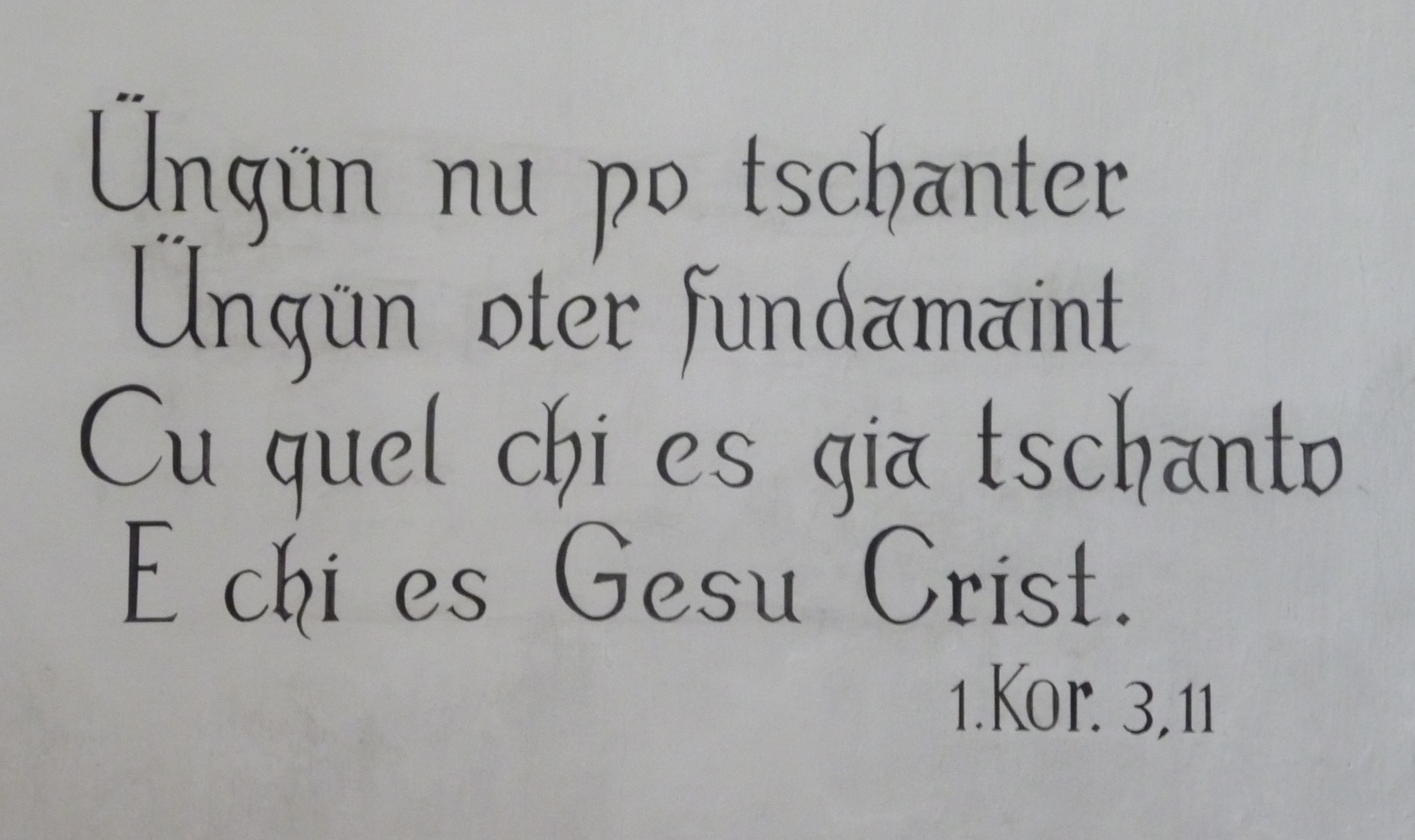 Reformierte Kirche Latsch GR: Inschrift